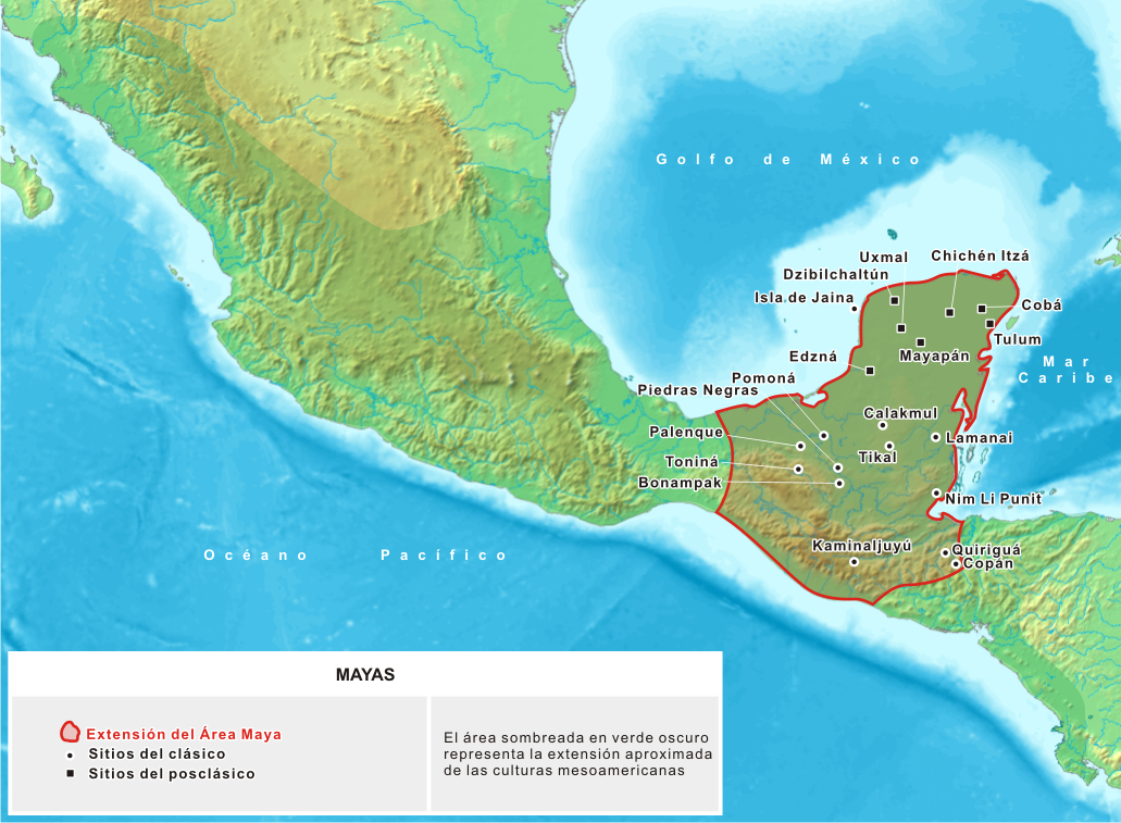 Mapa de la extensión de la cultura Maya, de los períodos Clásico y Posclásico de Mesoamérica.